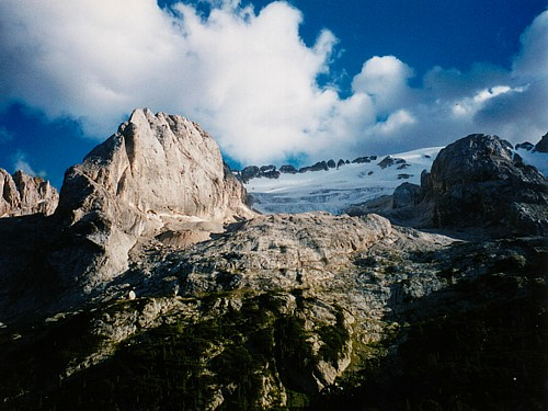 Uitzicht vanaf de Fedaiapas op de Marmolada